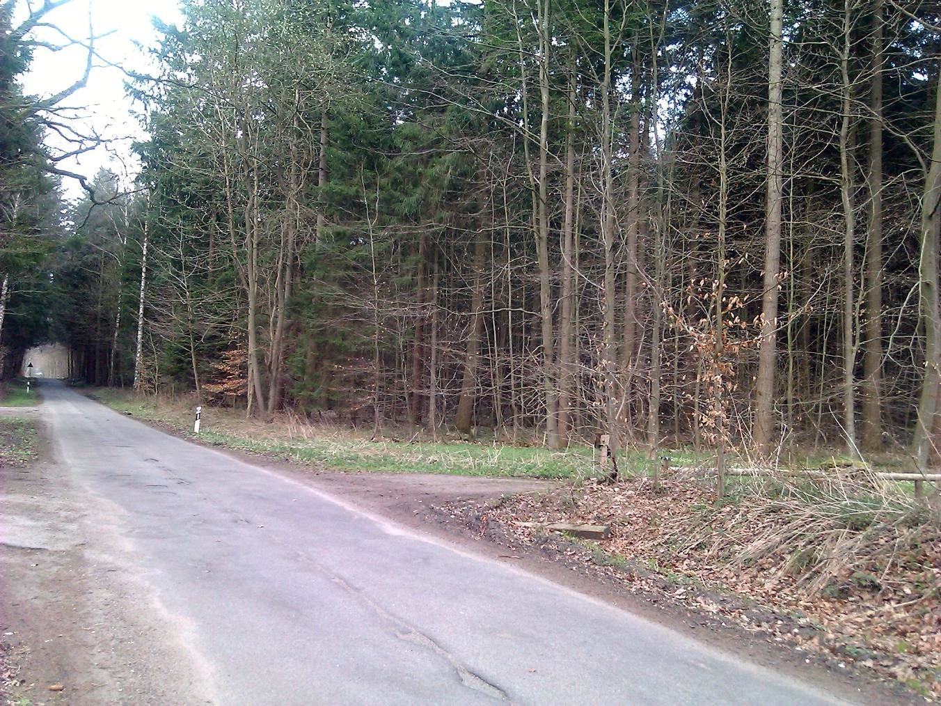 Nadelwald auf dem Gelände des ehem. Lagers Pöppendorf im Waldhusener Forst, an der Straße vom Forsthaus Waldhusen nach Pöppendorf beim Wanderparkplatz.